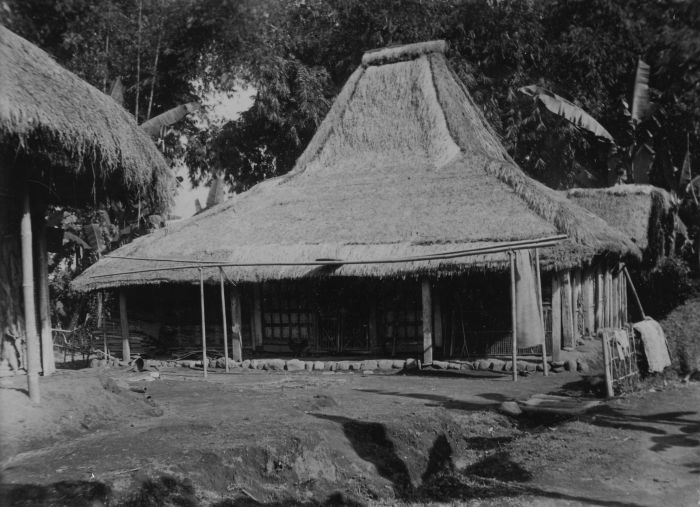 foto. Woonhuis met erf in een kampong